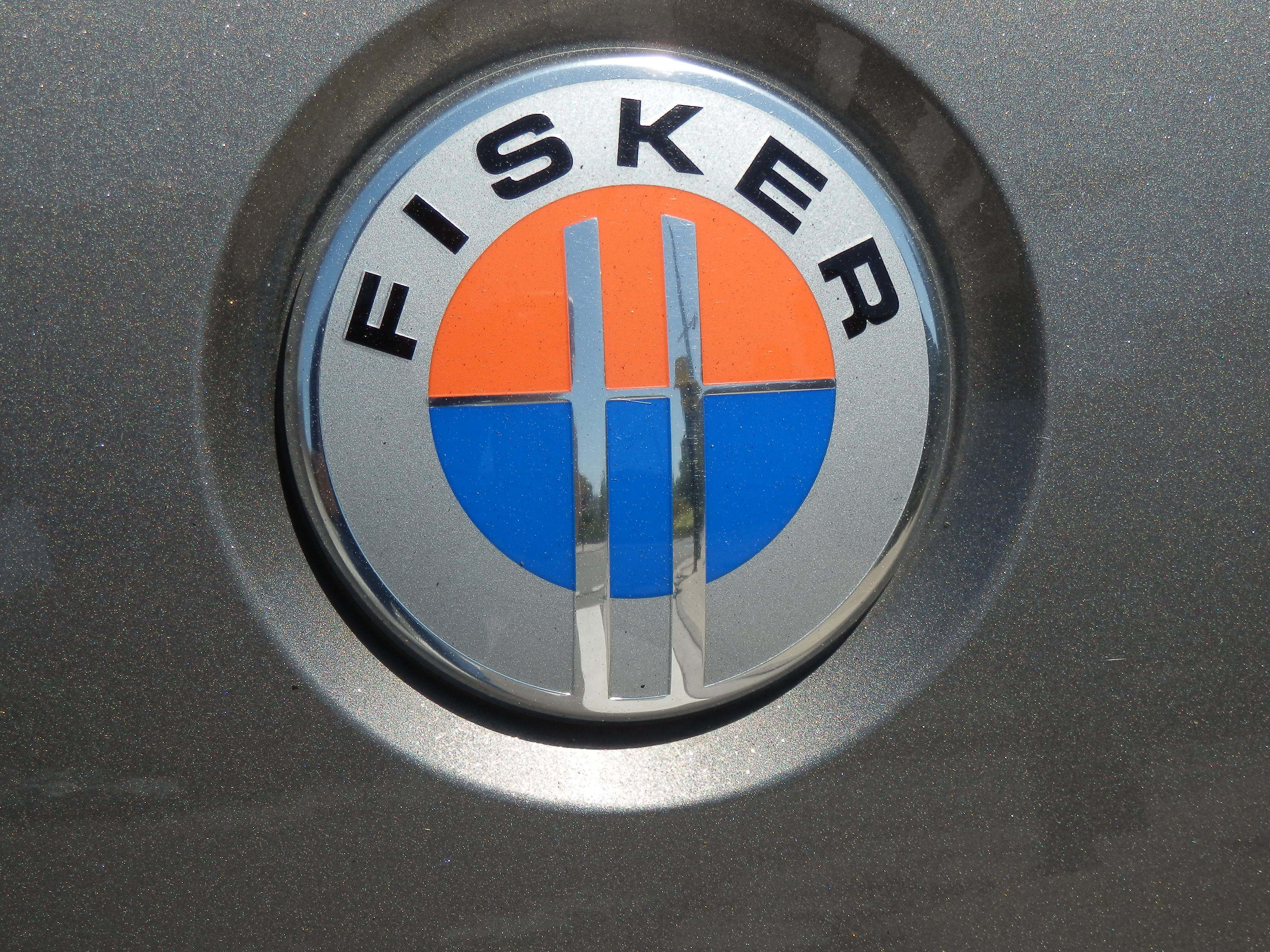 Emblema de Fisker en un Fisker Karma.